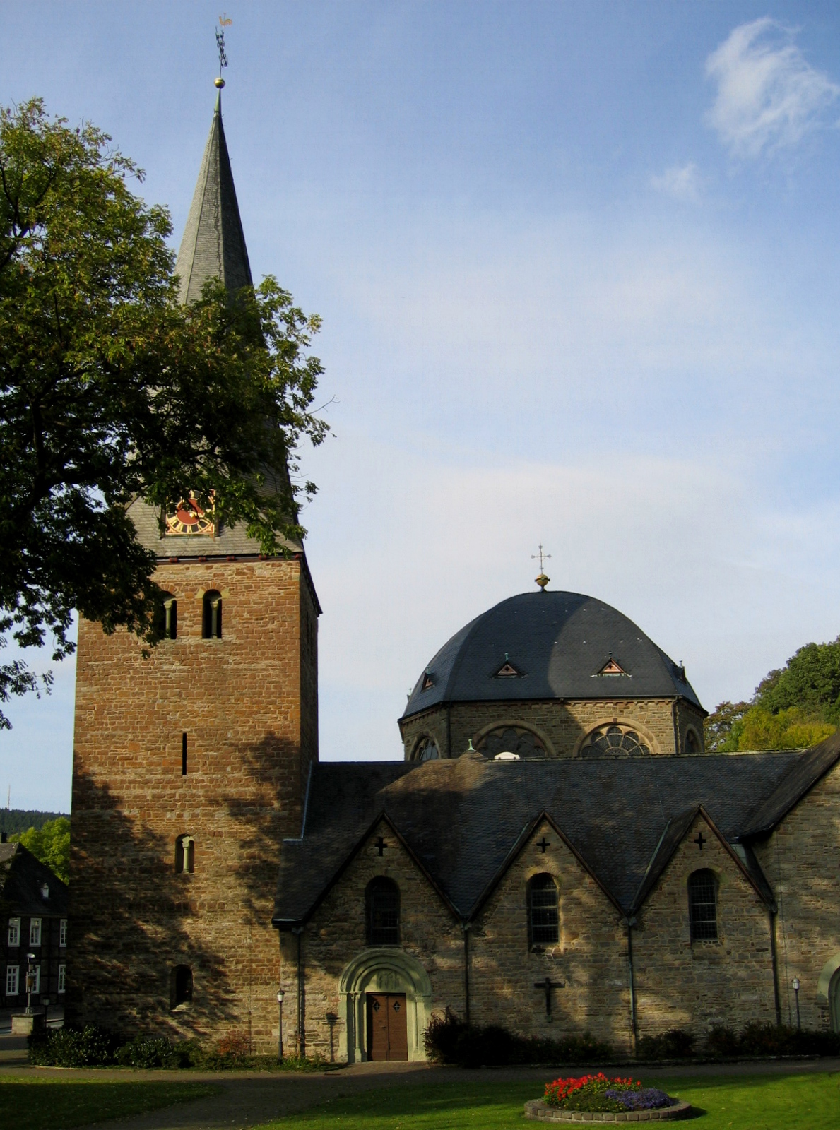 Description: Pfarrkirche St. Blasius (romanische Hallenkirche, 12./13. Jahrhundert) in Balve Source: selbst fotografiert Date: 9. Okt. 2005 Author: Bubo